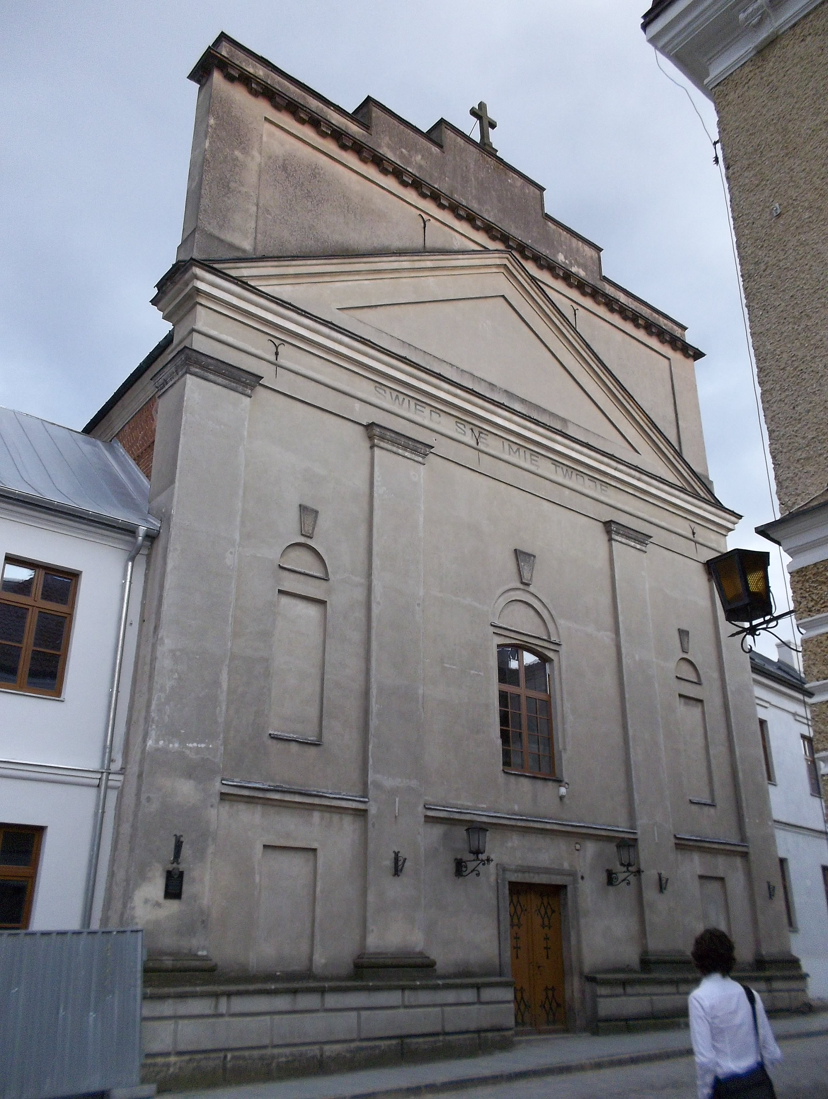 Kościół Świętego Ducha w Sandomierzu (zabytek nr rejestr. A.726/1-3)